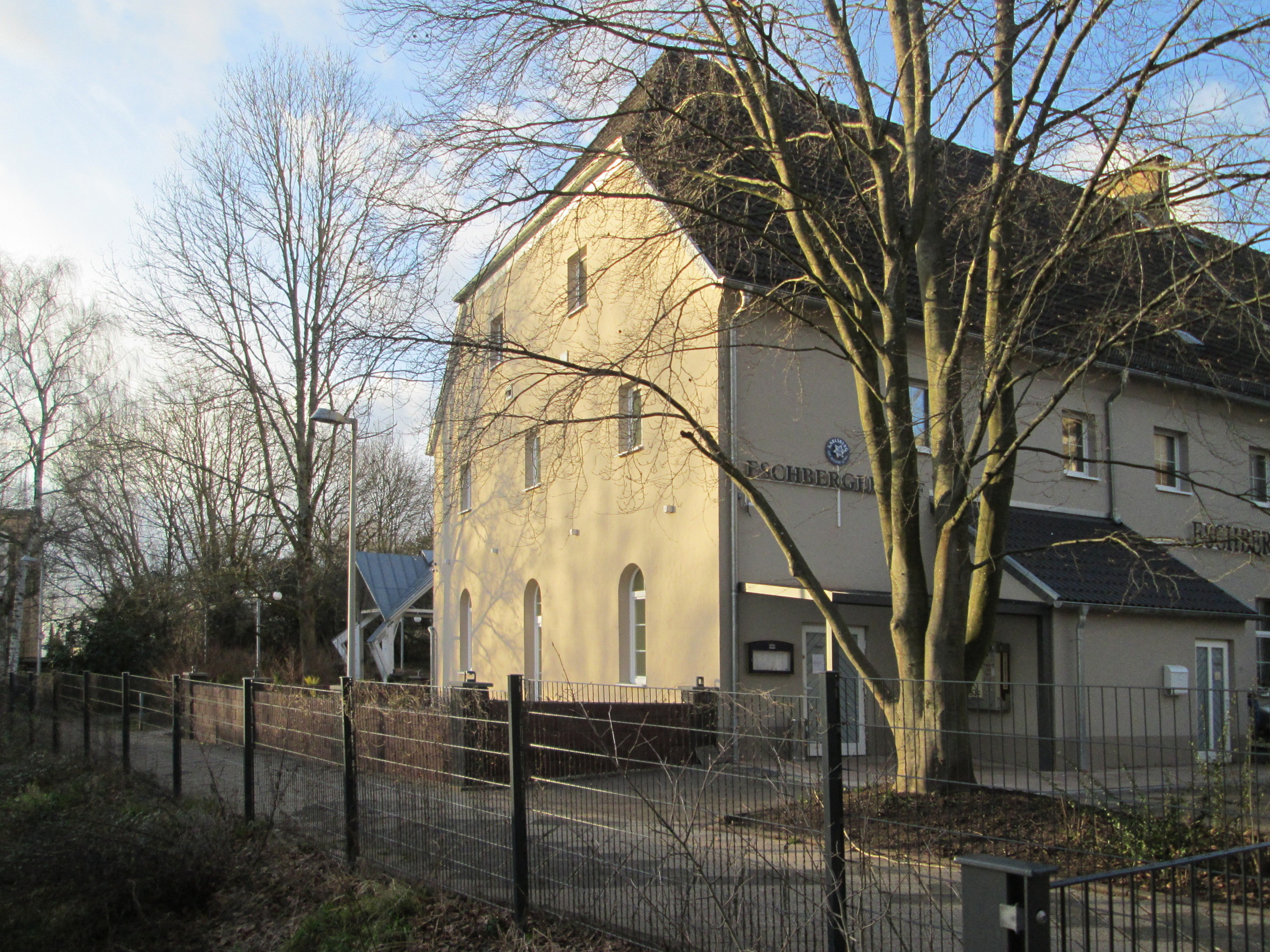 Eschberger Hof in Saarbrücken, ehem. Landgut der Herrschaft von Nassau-Saarbrücken. Nur ein Flügel des um 1800 errichteten Herrenhauses erhalten